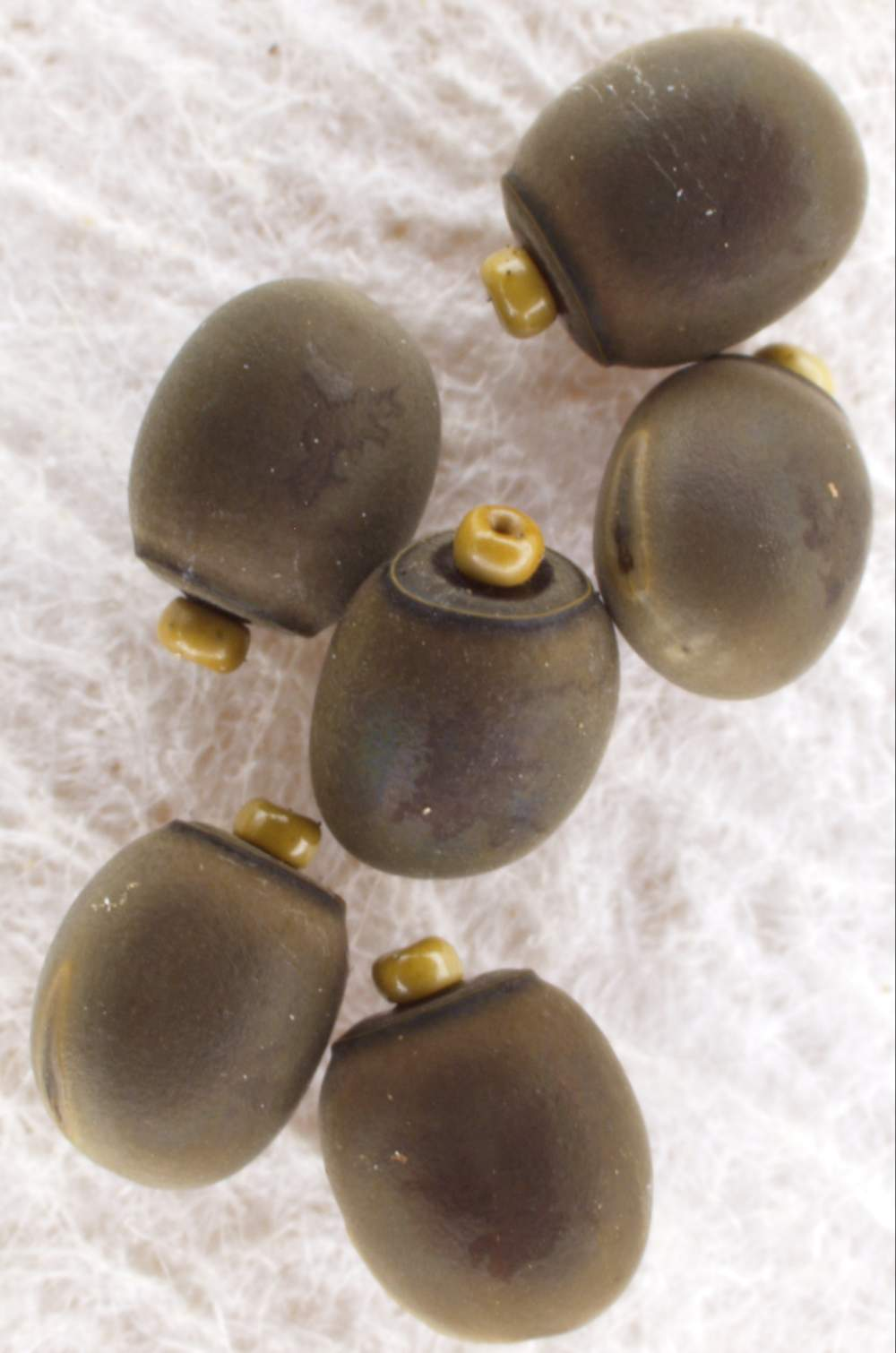 eieren carausius morosus - eigen werk